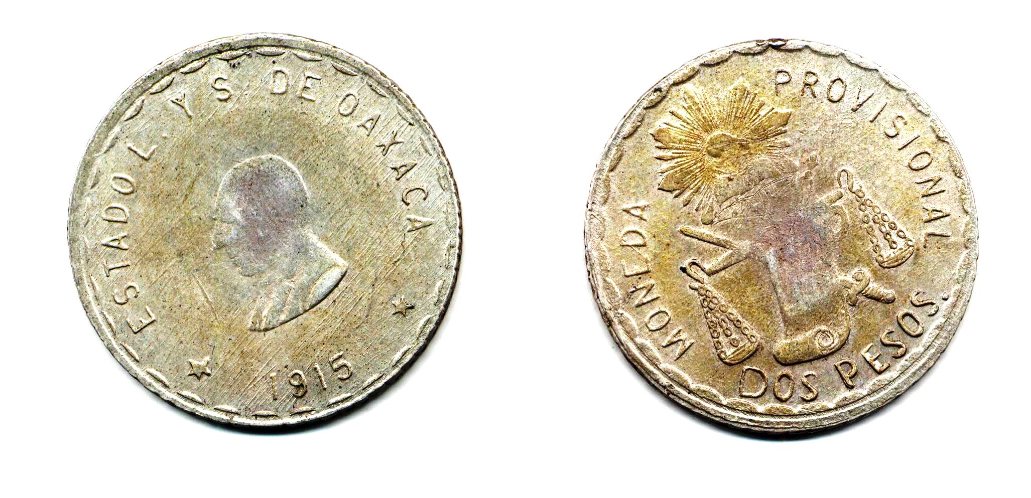 Moneda de 2 peso de Oaxaca de acuñada en plata en 1915 anverso de busto de base redonda.